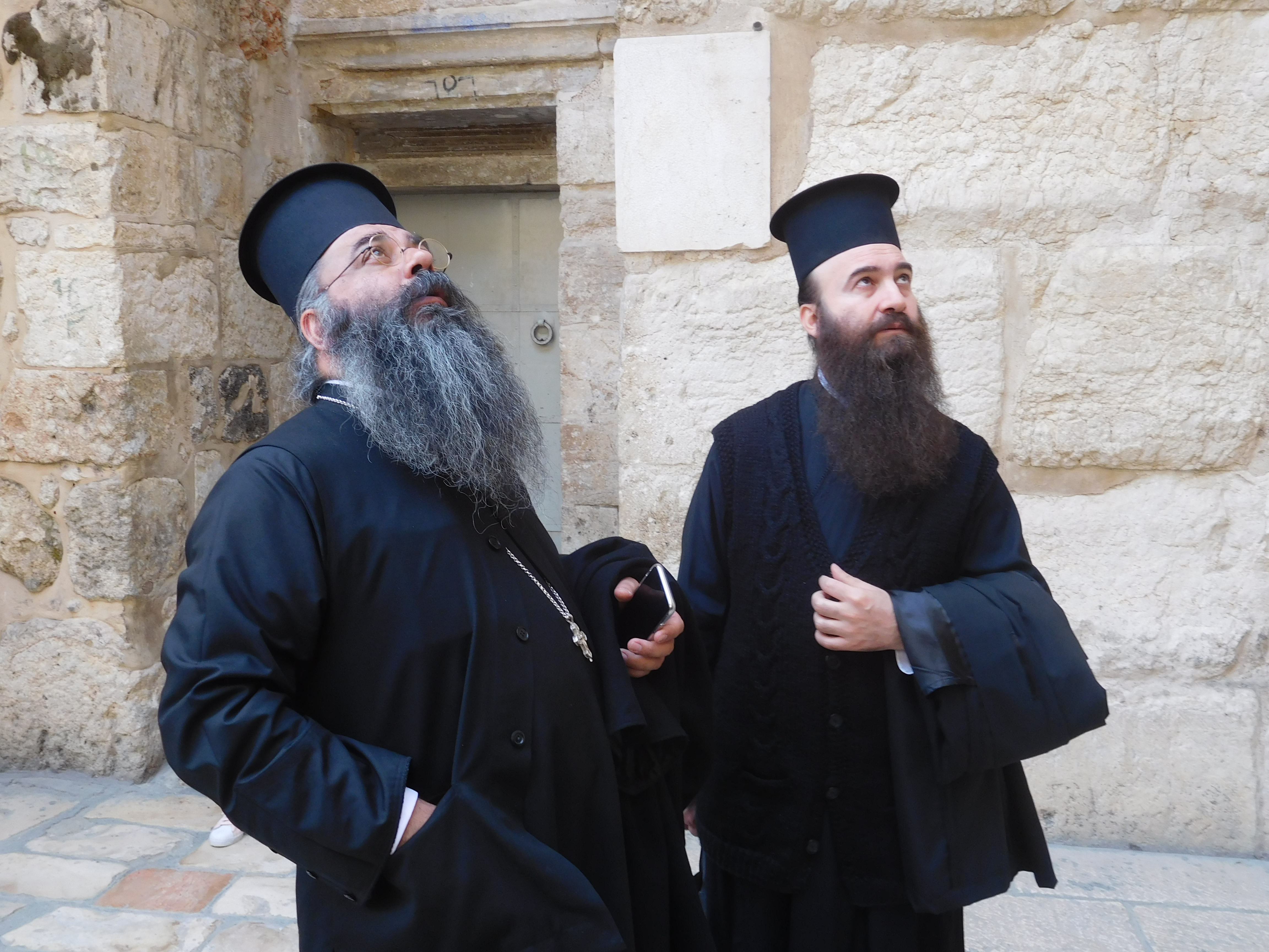 Настоятель Храма Гроба Господня архиепископ Исидор (Факицас) (Иерусалимcкой православной церкви) во дворе Храма наблюдает за Недвижимой лестницей